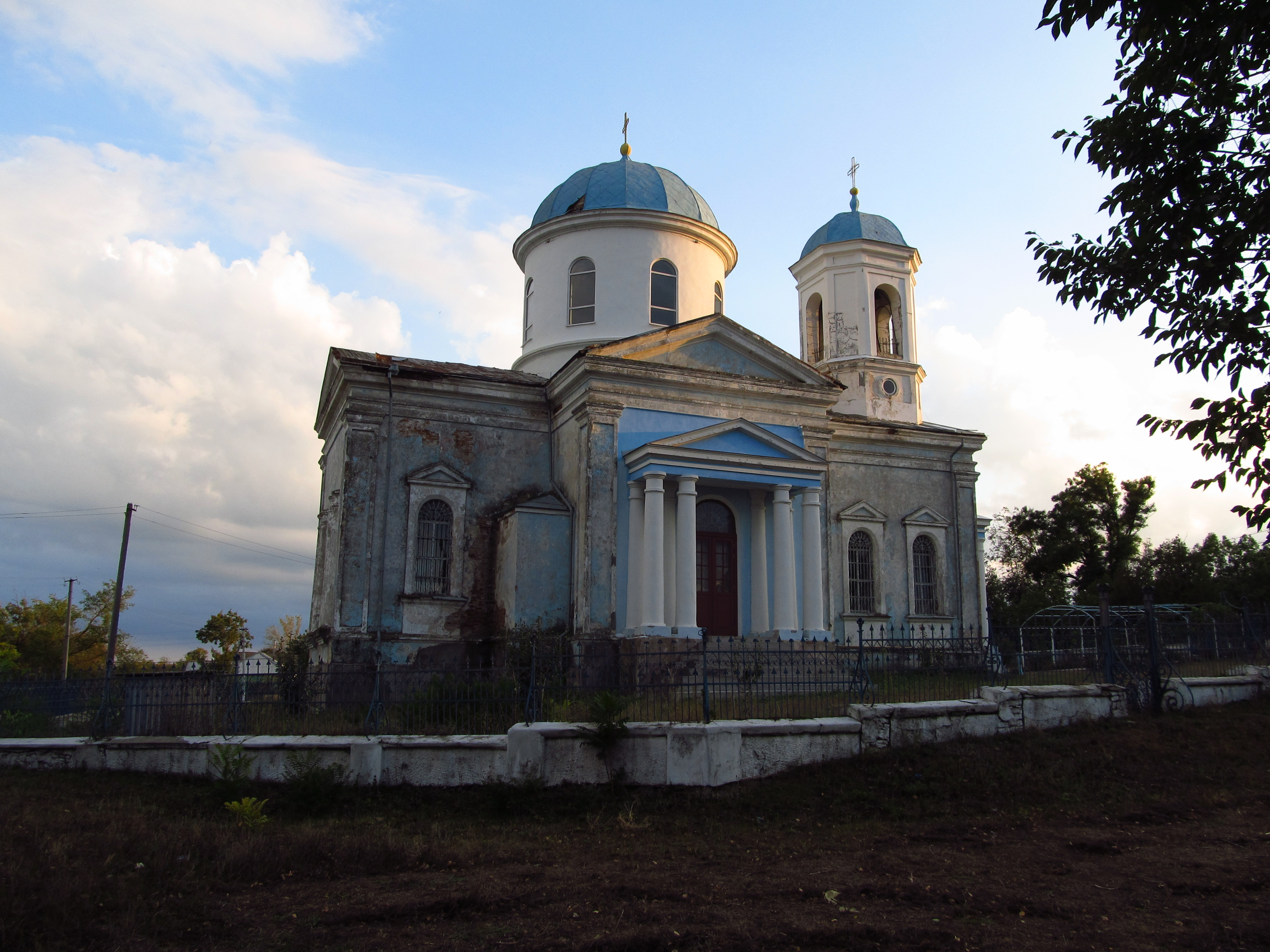 Свято-Михайлівська церква, Ренійський район, с. Плавні